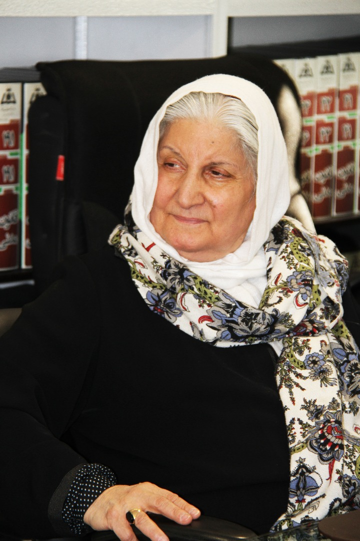 نوش آفرین انصاری در مرکز پژوهشی دانشنامه های حقوقی علامه